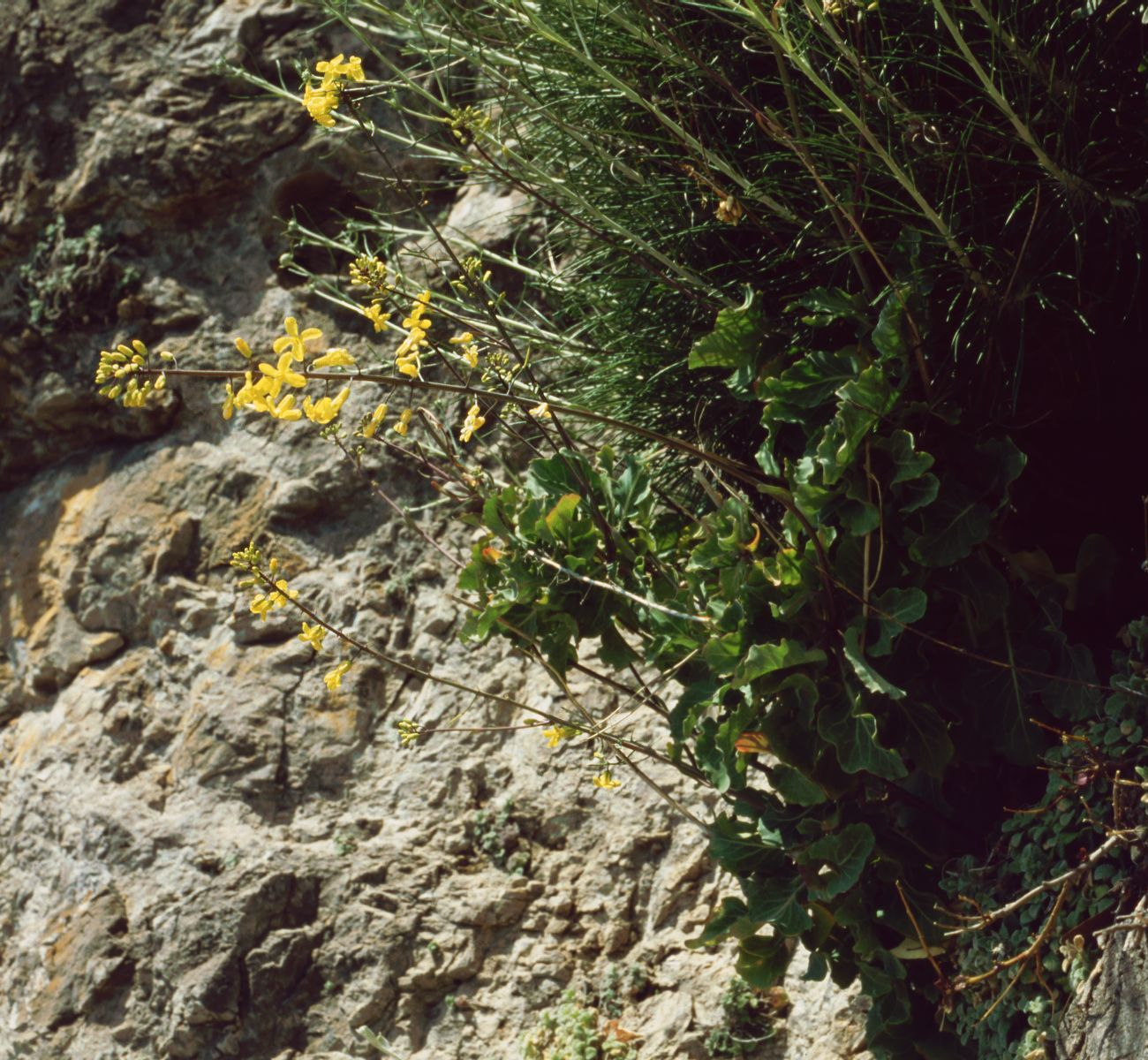 Brassica cretica subsp. aegaea, Kreuzblütler (Brassicaceae) – Griechenland/Ελλάδα/Greece: Erisos/Έρισος, Assos/Άσσος, Südhang des Festungsbergs (Kefallinia/Κεφαλληνία)